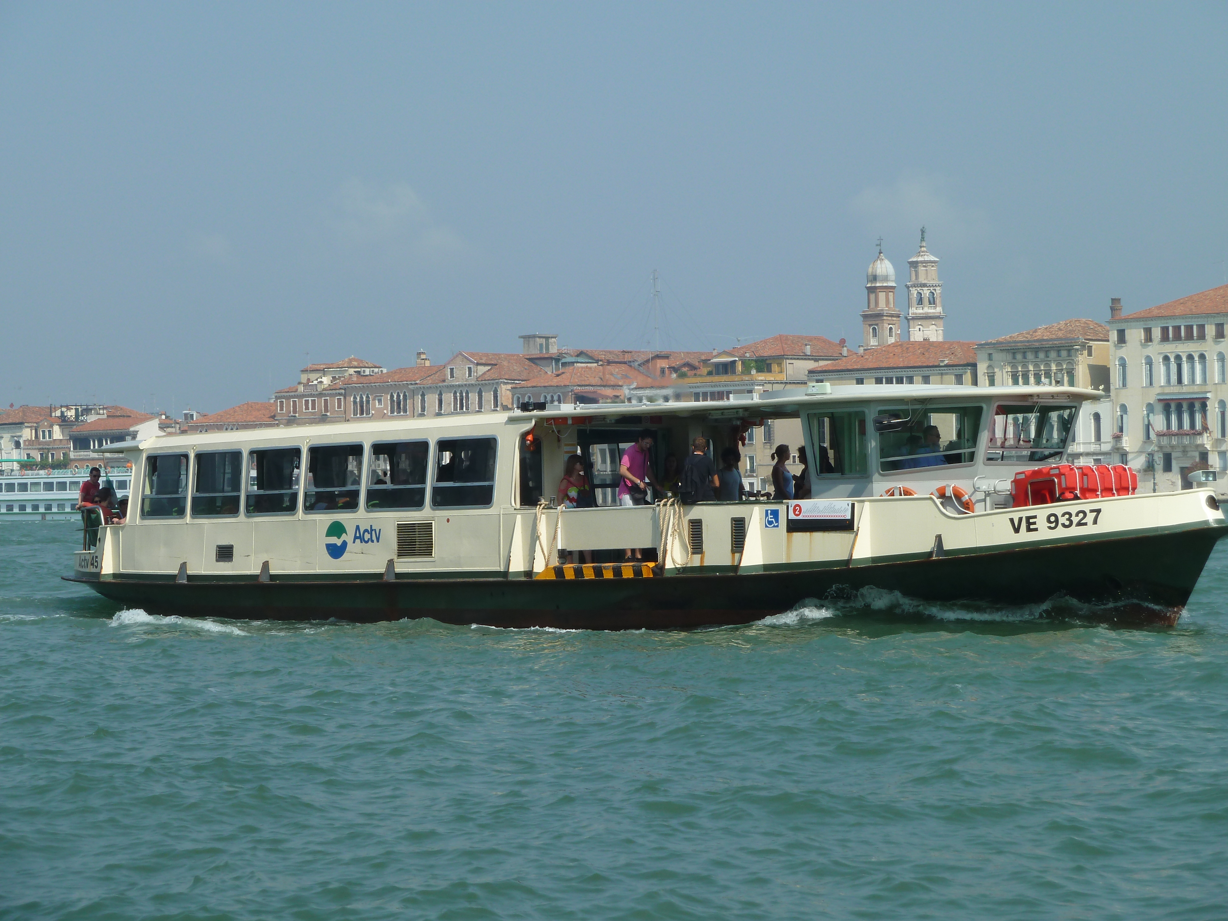 vaporetto